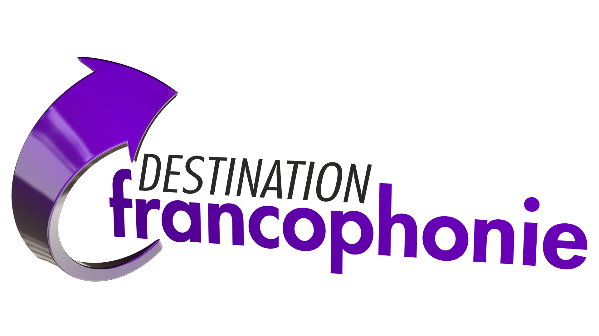 Logo de l'émission Destination Francophonie